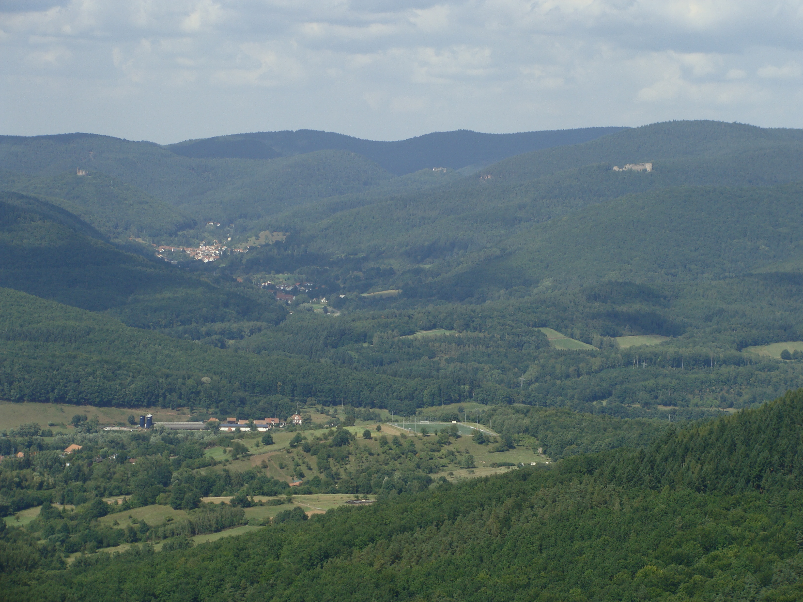 Dernbachtal mit den Orten Dernbach und Ramberg, sowie den Burgruinen Ramburg, Meistersel und Neuscharfeneck